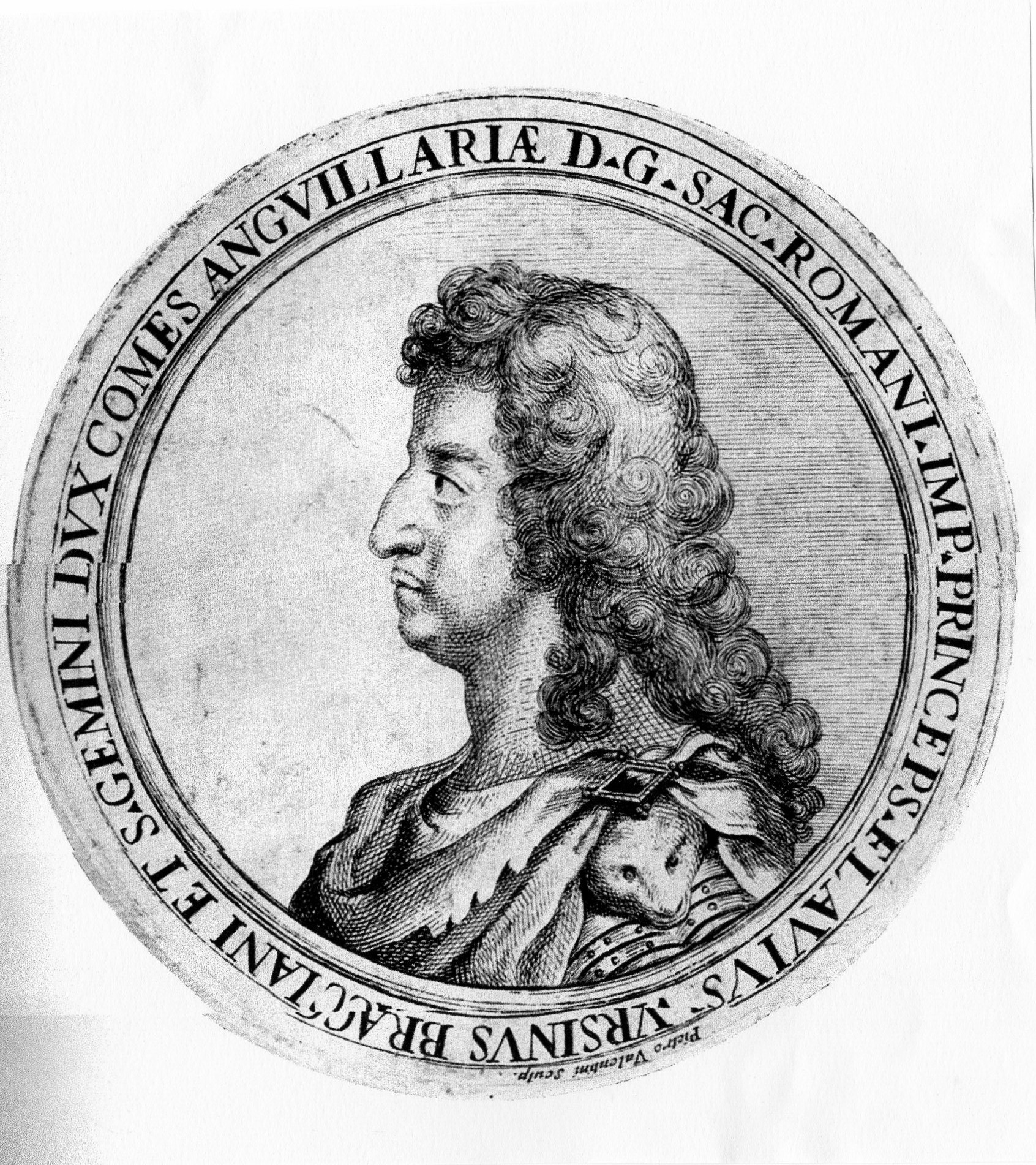 medaglia di Pietro Valentini con effigie di Flavio I Orsini, duca di Bracciano (1660-96)